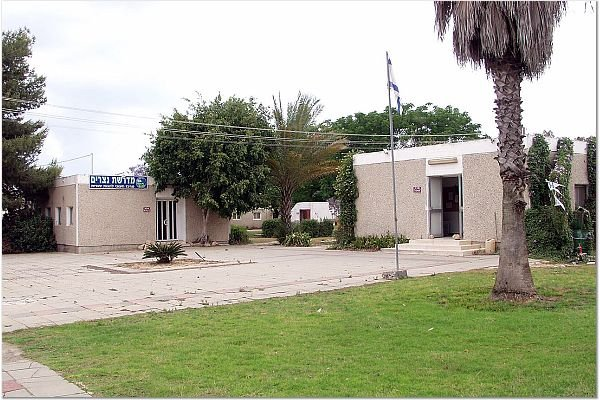 נצרים התמונות באדיבות קטיף.נט (קישור) אתר האינטרנט של גוש קטיף. צילם: מוטי סנדר.